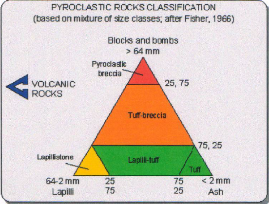 klasifikasi piroklastik